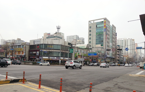 주안역삼거리. 주안역 역사 앞의 삼거리 (남쪽)